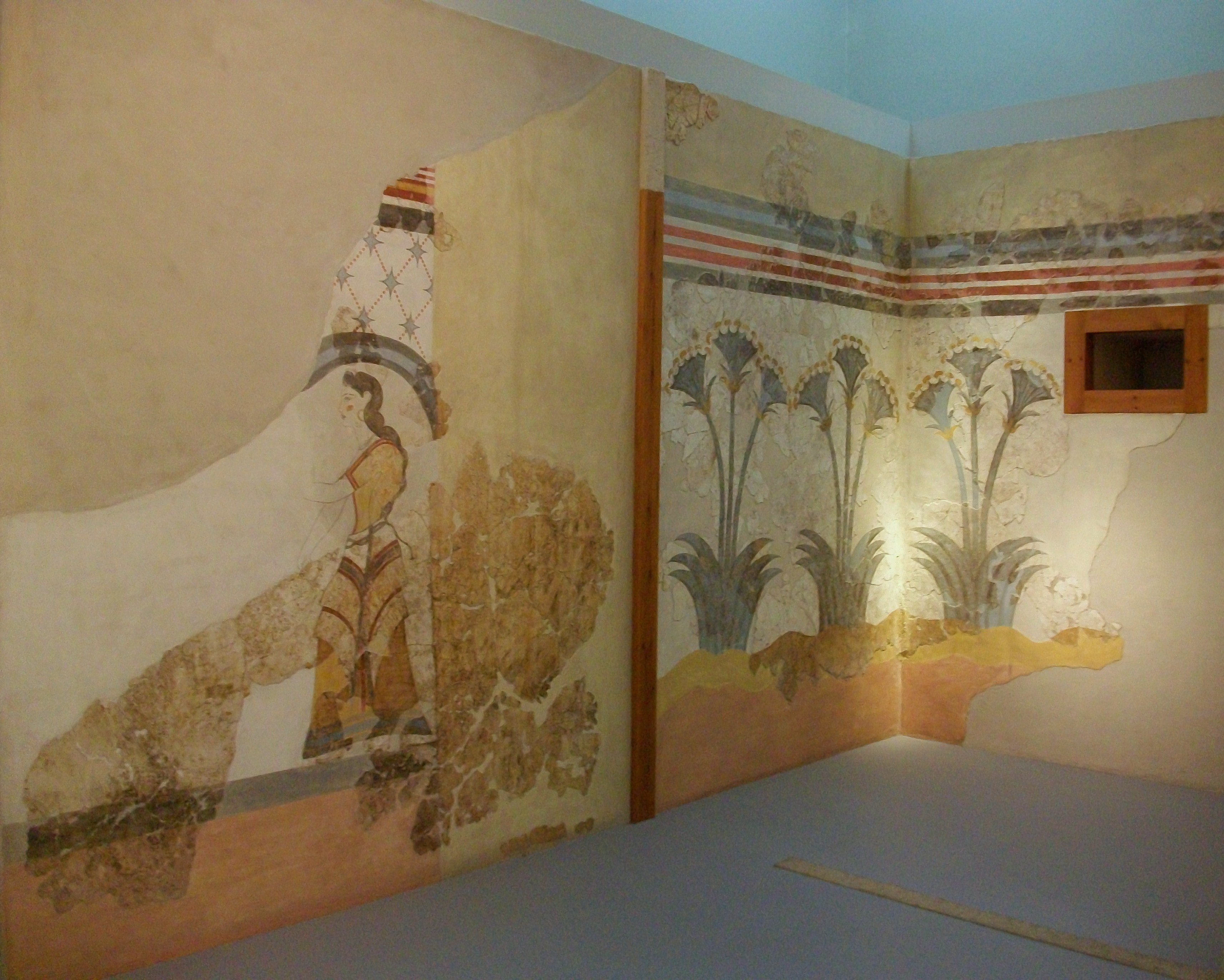 Frescos de la 'Casa de les Dames' d'Akrotiri, Museu de la Prehistòria de Thira, Santorí.